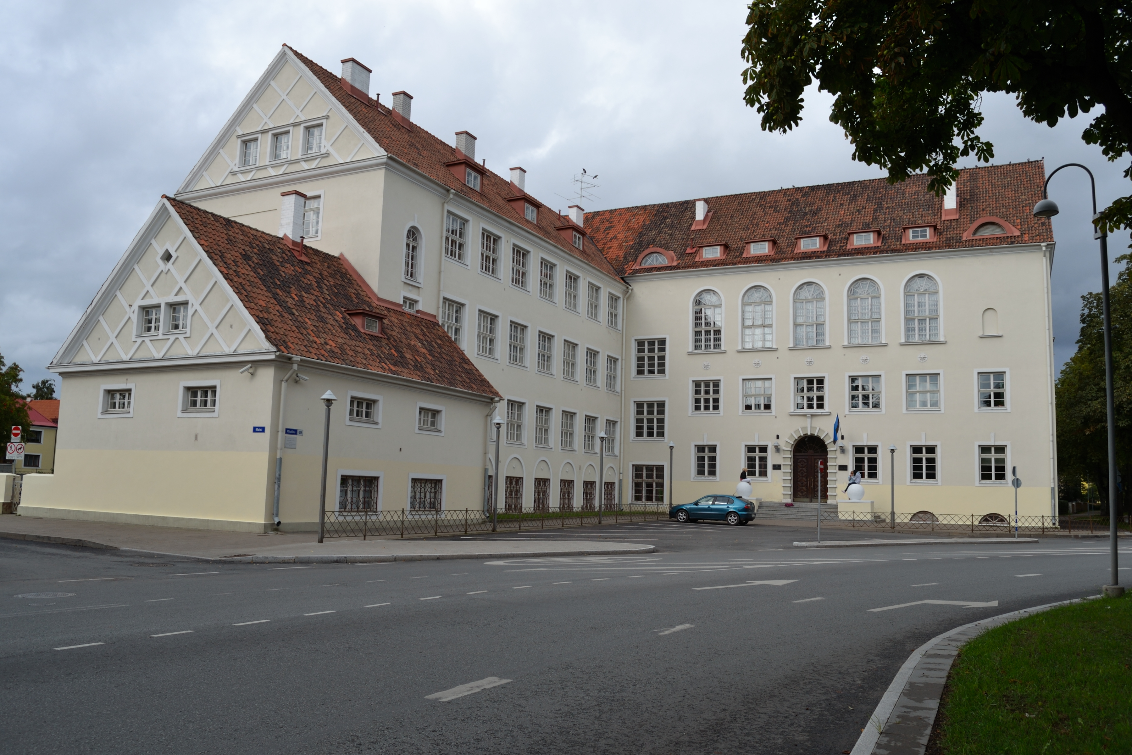 Tallinn, koolihoone Ristiku 69, 1929